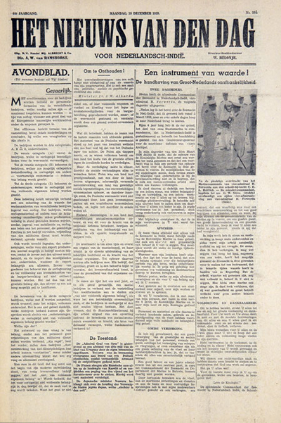 Voorpagina